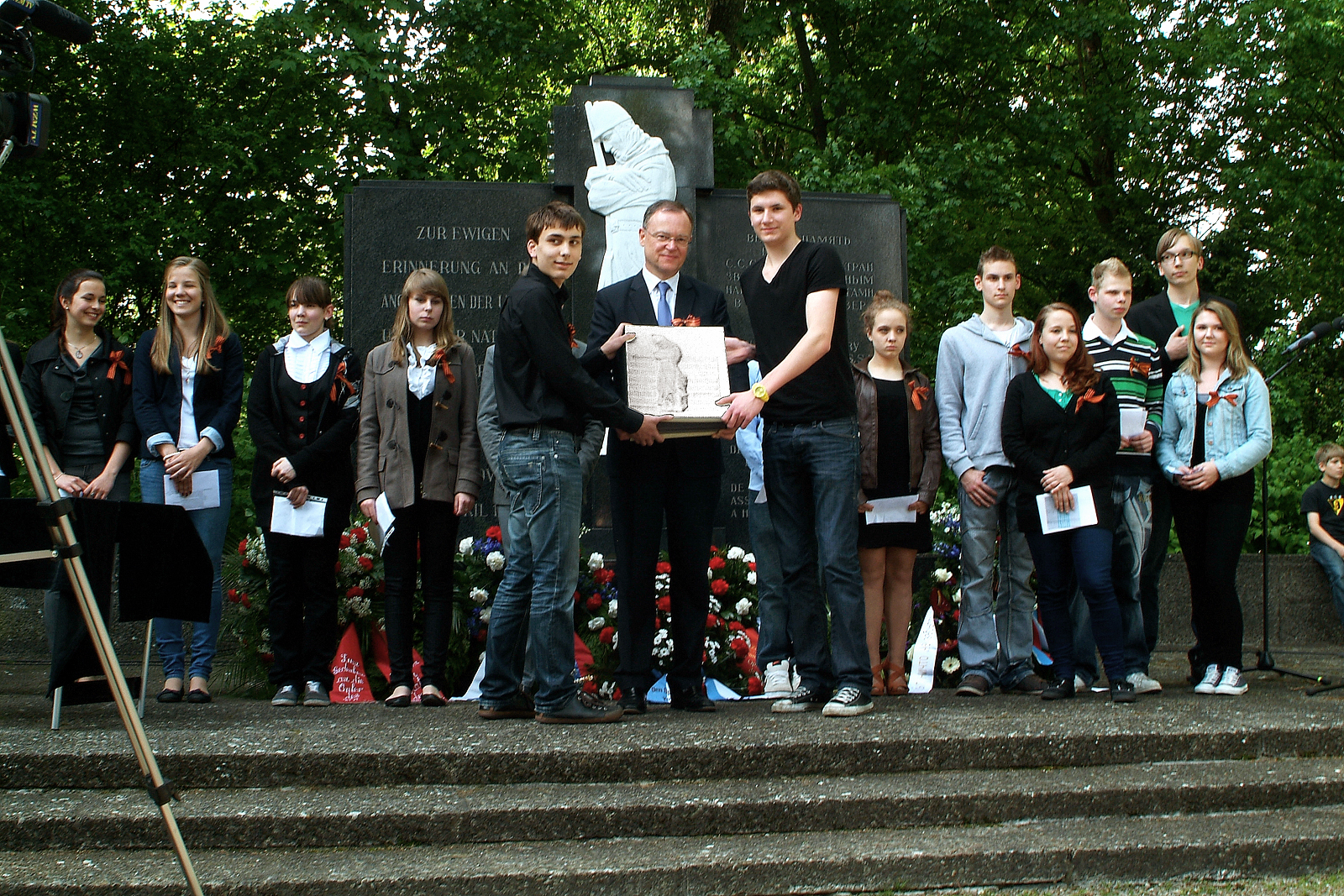 Oberbürgermeister Stephan Weil mit Schülern der St.-Ursula-Schule und der Bertha-von-Suttner-Schule aus Hannover sowie Schülern vom "Gymnasium 192" aus St. Petersburg mit dem Gedenkbuch für die Ermordeten.